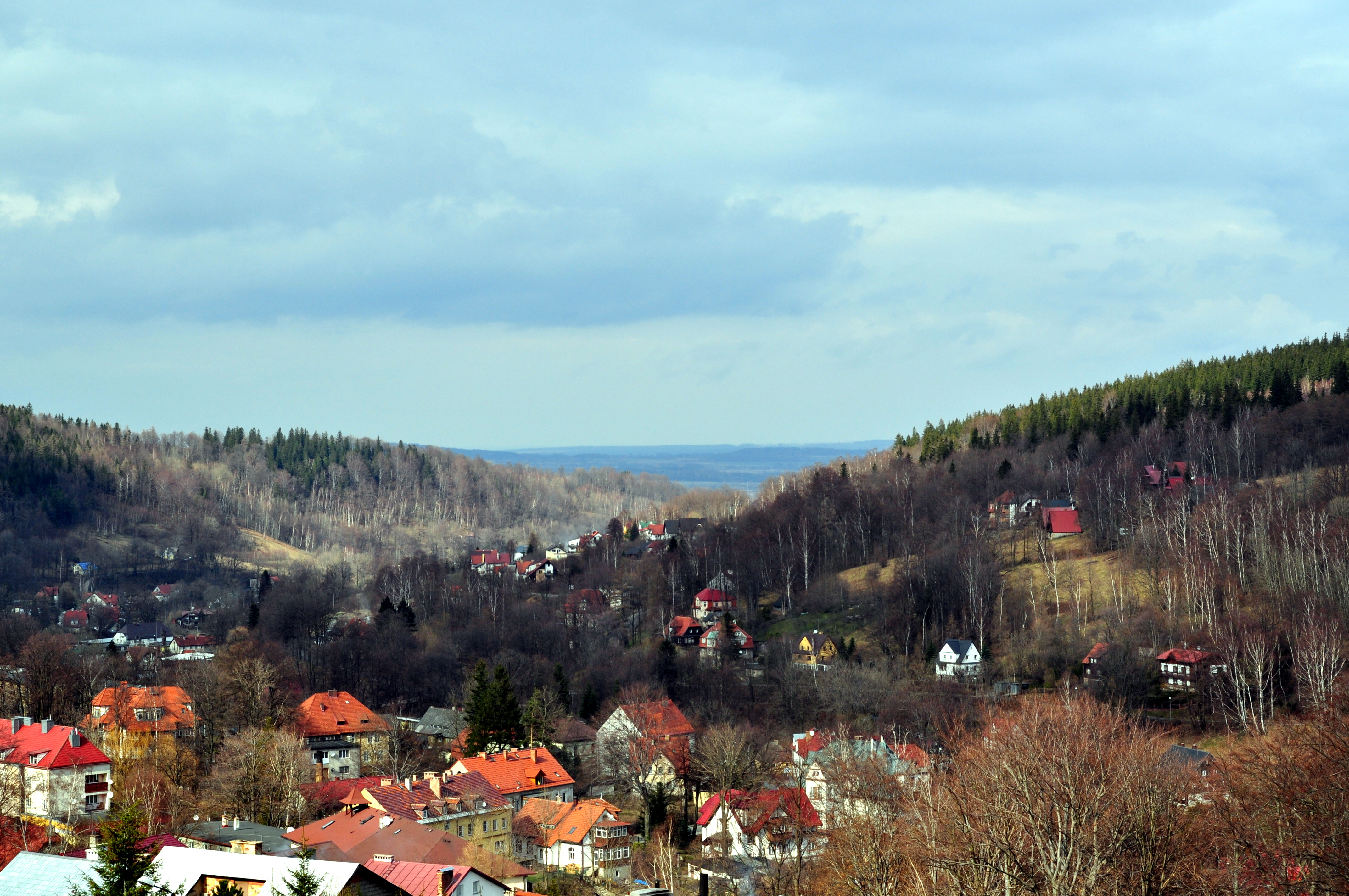 m. Świeradów-Zdrój, XVII-XIX 28.02.1980.